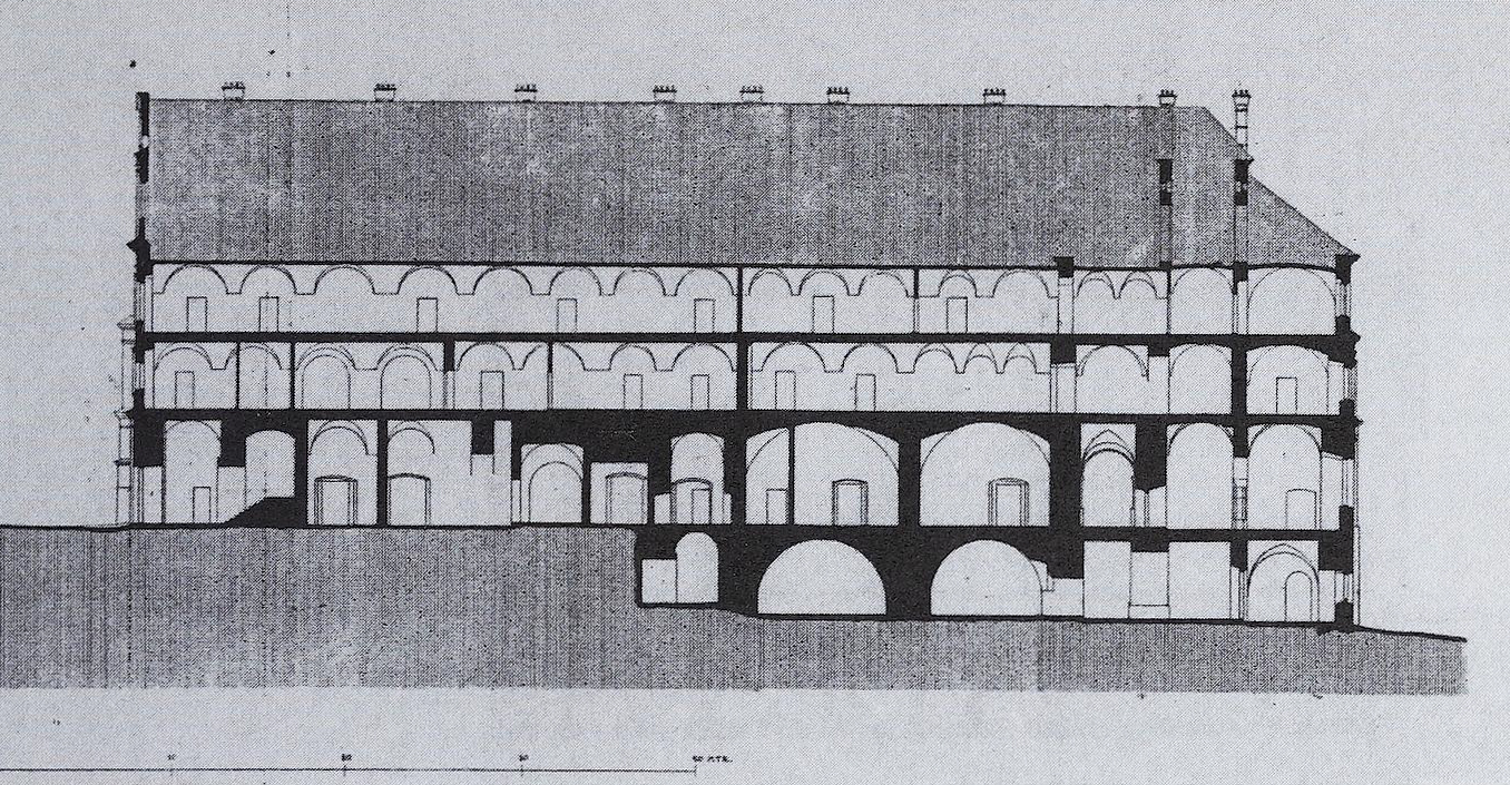 Беларуская (тарашкевіца): Пінск (Pinsk), рог вуліцы Набярэжная (vulica Nabiarežnaja) і пляцу Рынку (plac Rynak). Калегіюм езуітаў, абмеры